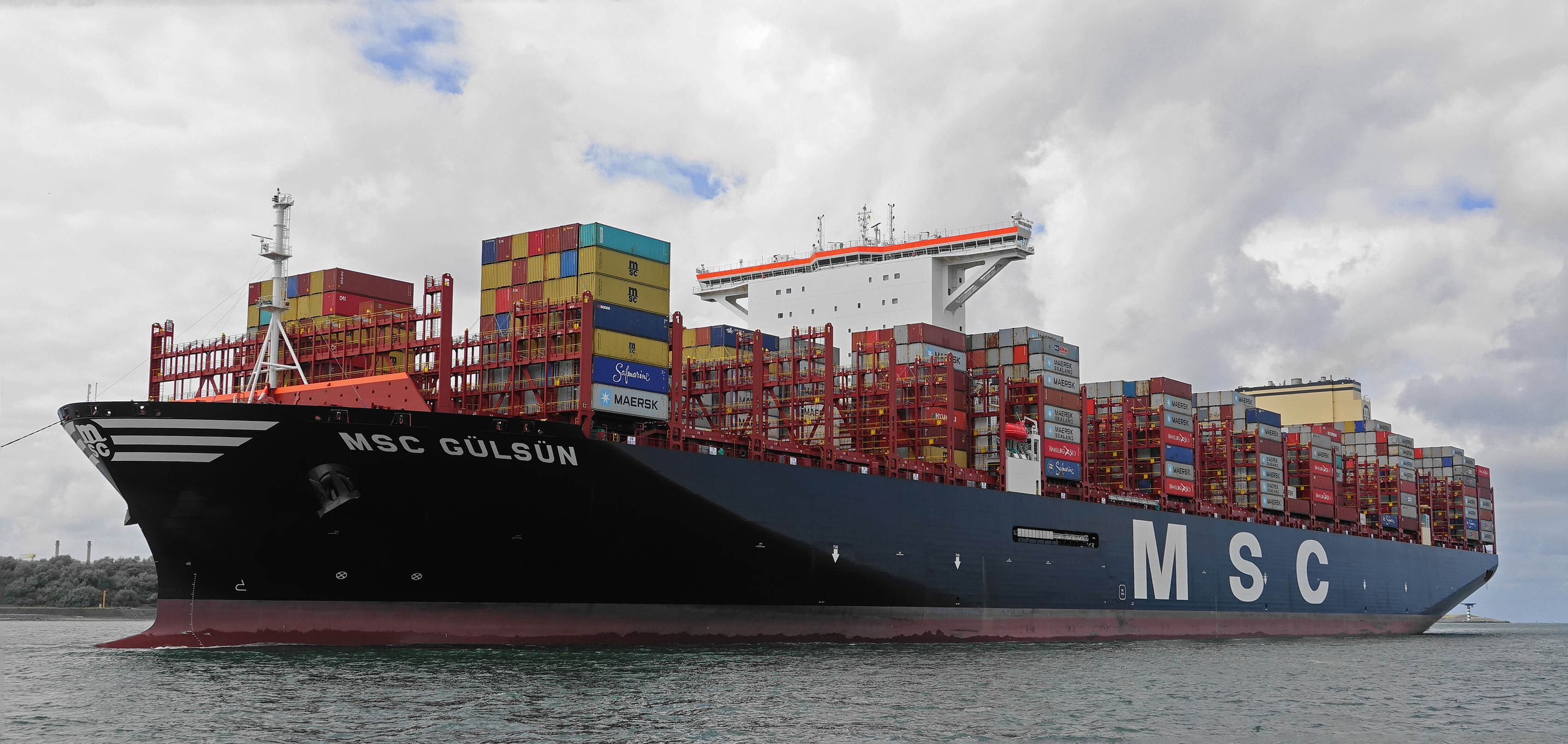 Eerste bezoek aan Rotterdam van het grootste containerschip ter wereld de MSC GÜLSÜN 23.756 TUE , gezien vanaf de Nieuwe Maze 3-9-2019